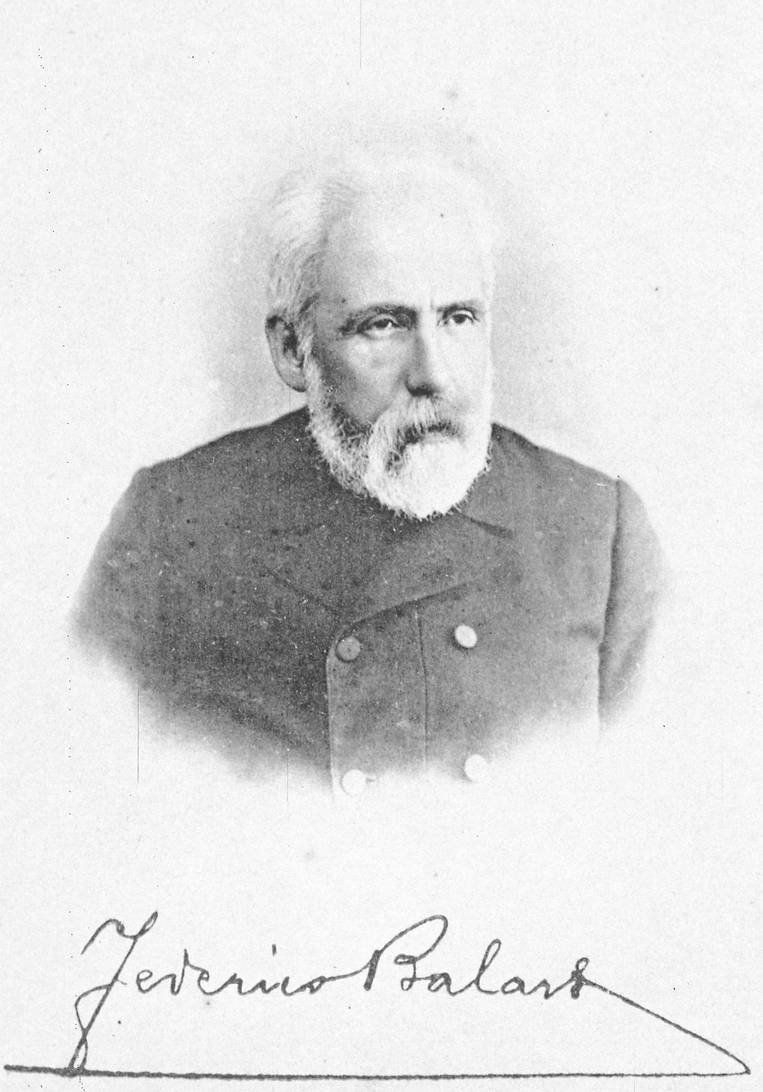 Retrato de Federico Balart